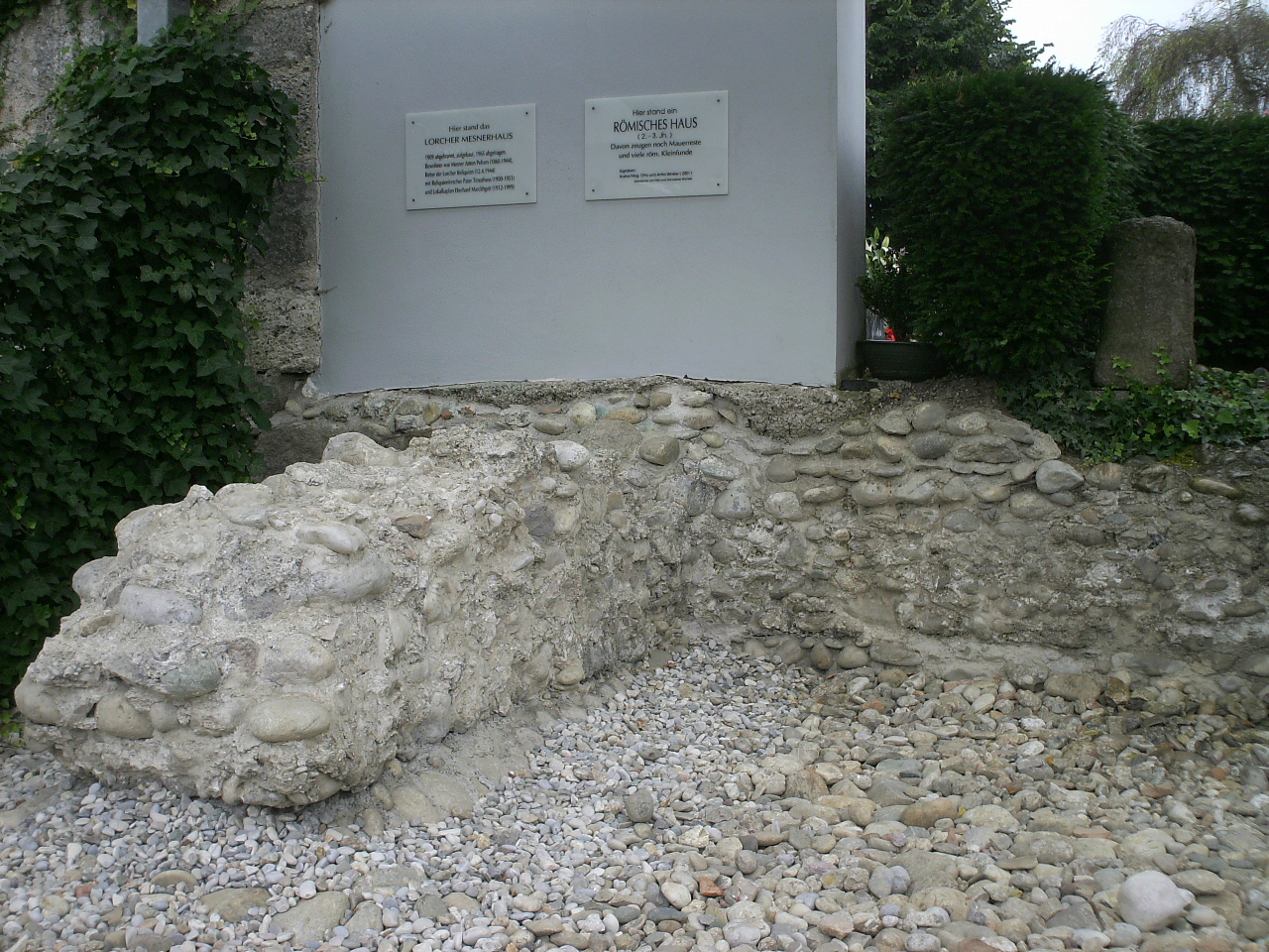 Mauerrest eines antiken Hauses der Zivilstadt (St Laurenz Basilika)